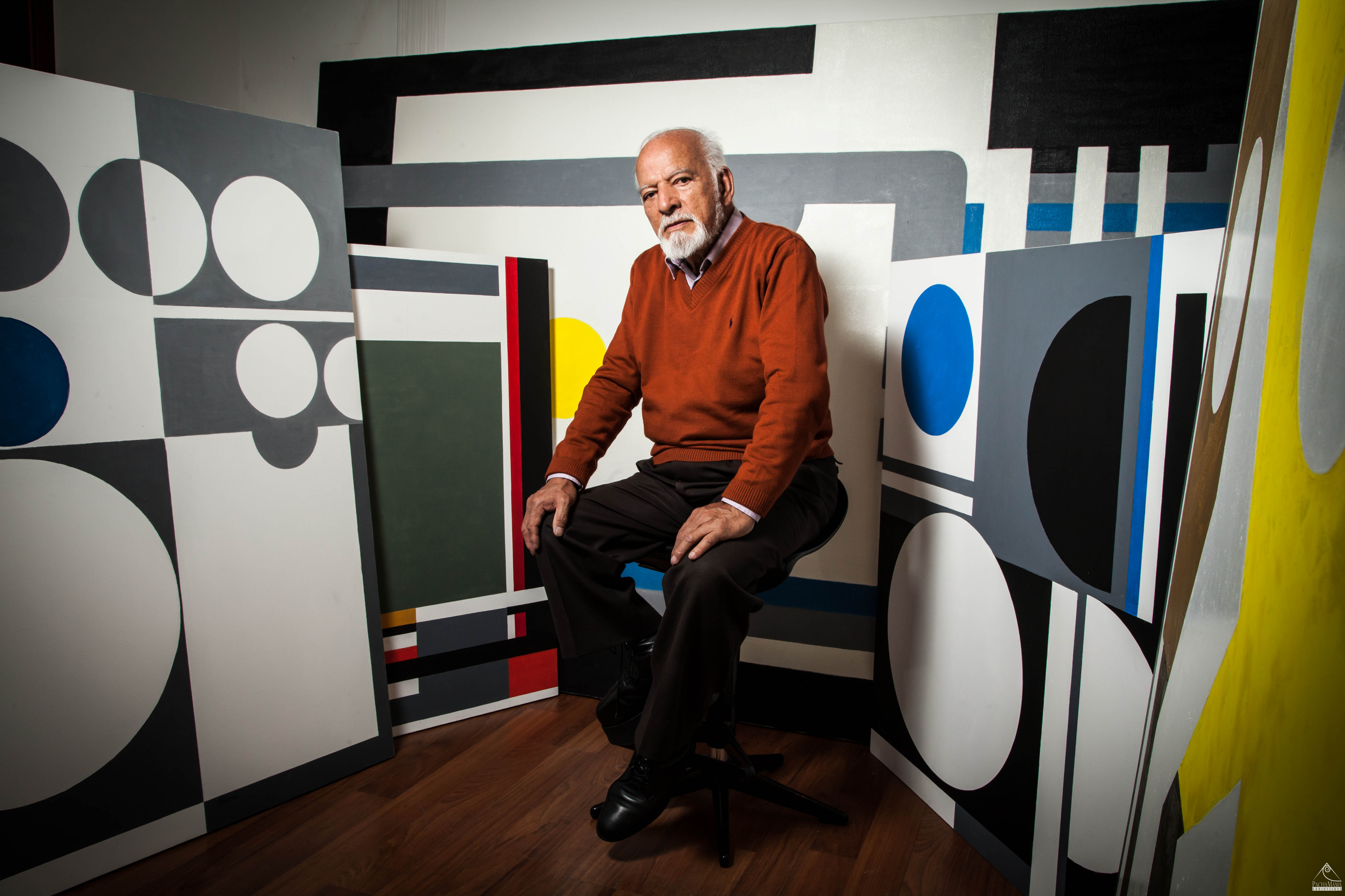 Maestro Jorge Riveros en su taller